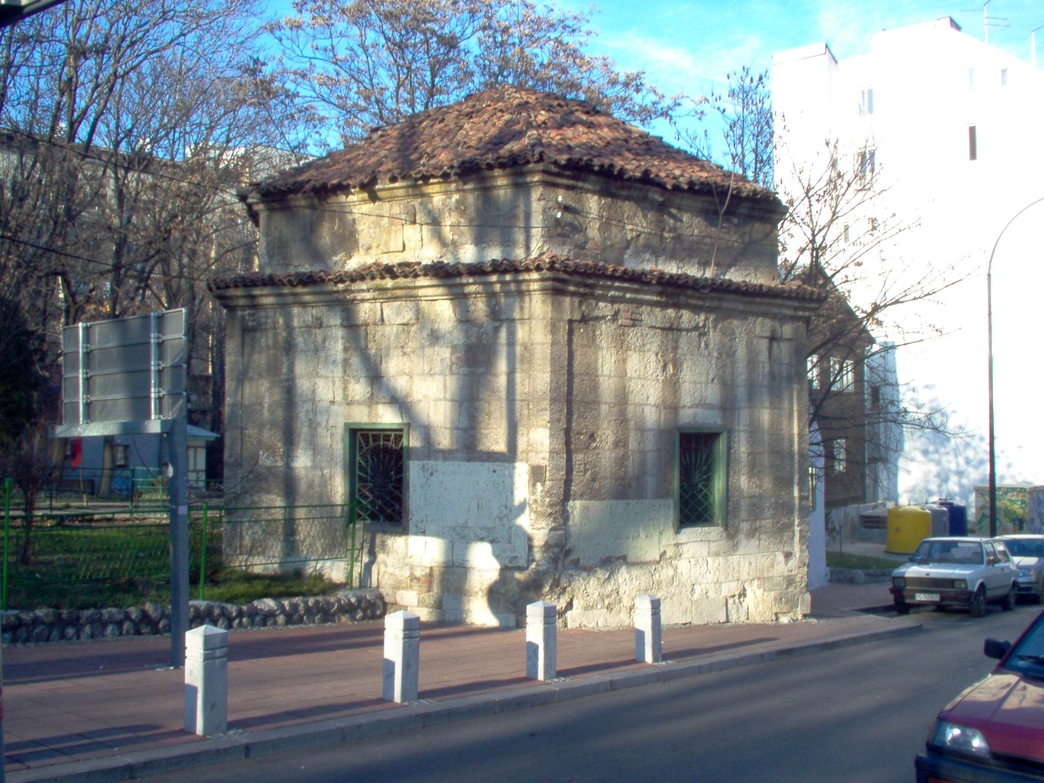 Турбе шеих Мустафе у београду. Фотографисао Голдфингер